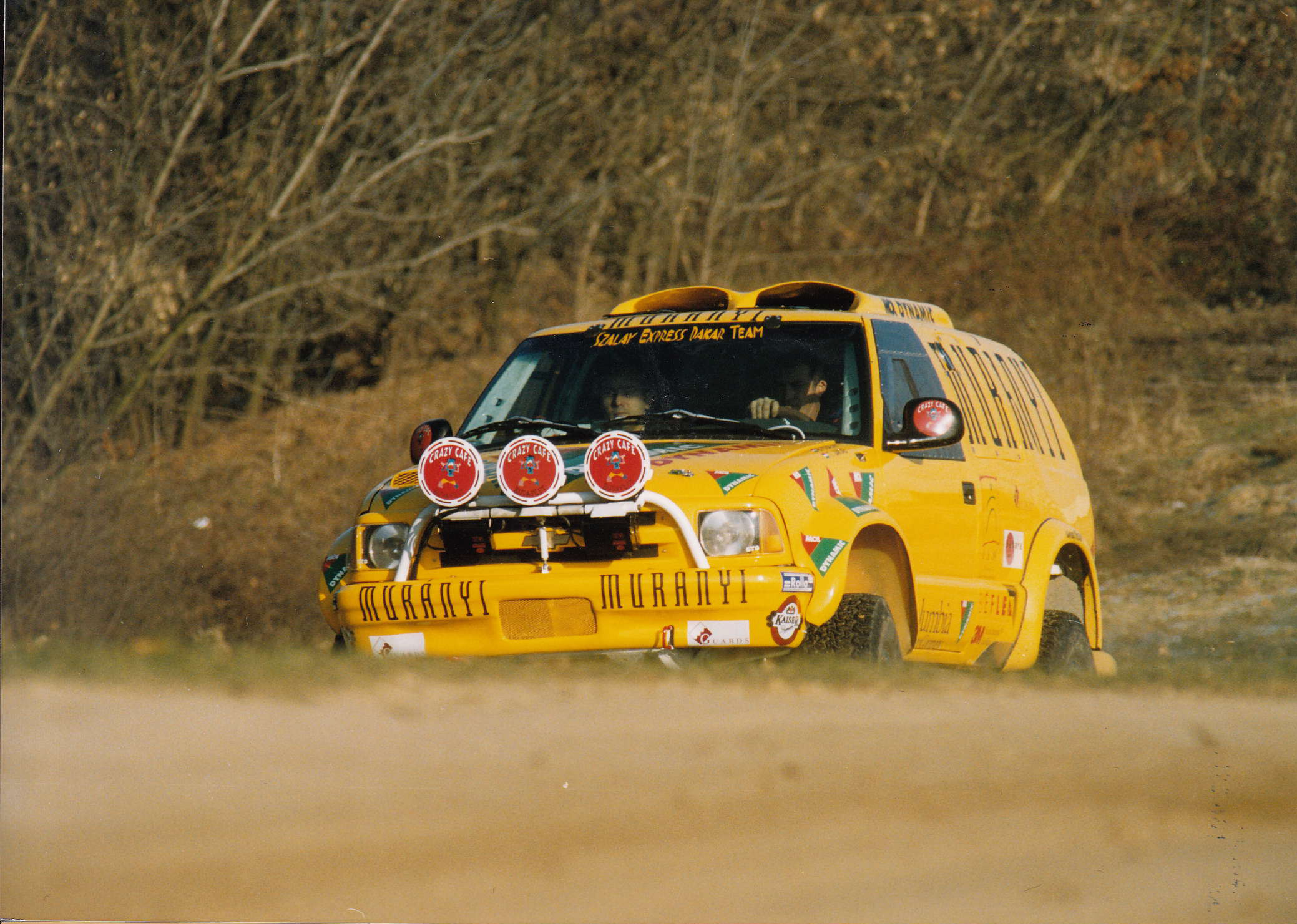 Dakar-rali 2000